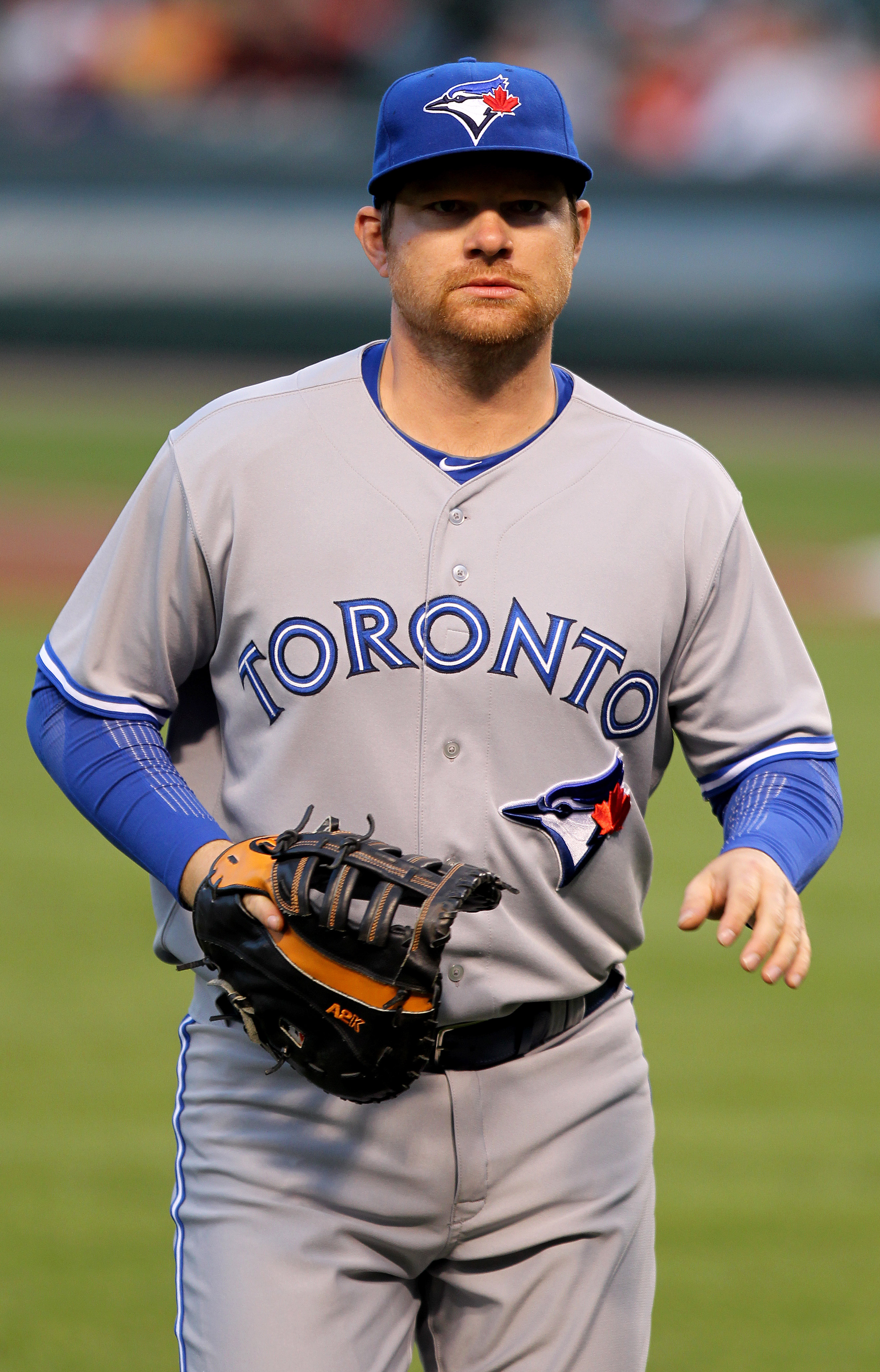 Adam Lind